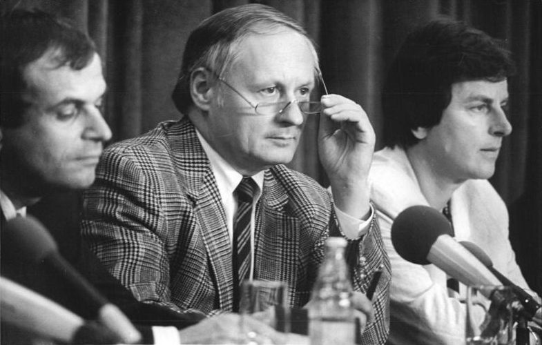 Leipzig, Oskar Lafontaine, Anke Fuchs ADN-ZB Kluge 3.9.90 wü Leipzig: Lafontaine-Besuch. Der saarländische Ministerpräsident und SPD-Kanzlerkandidat Oskar Lafontaine (M) und die SPD-Spitzenkandidatin für die Landtagswahl in Sachsen, Bundesgeschäftsführerin Anke Fuchs (r), stellten sich im Hörsaal 19 der Karl-Marx-Universität den Fragen der Journalisten.